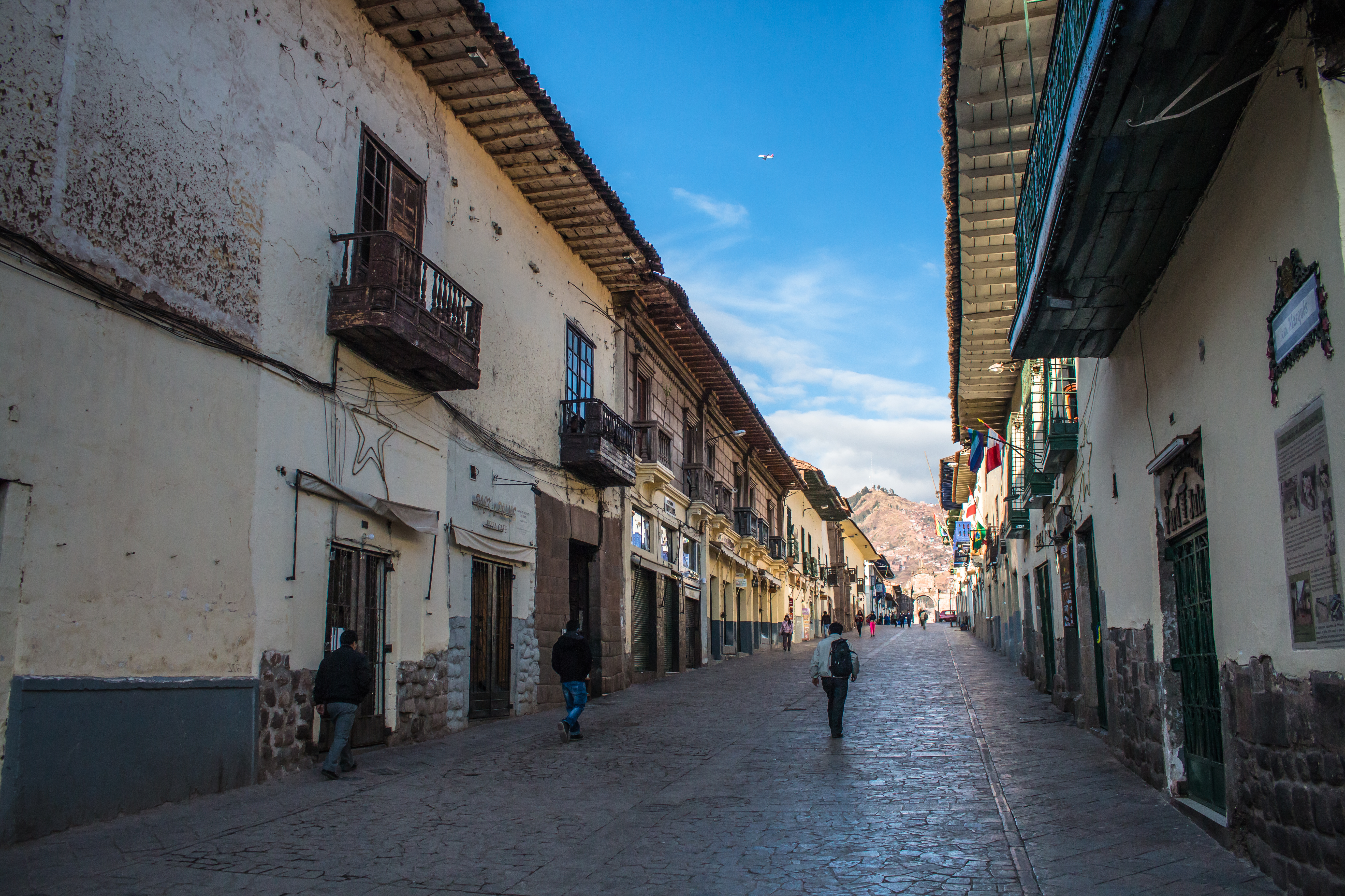 Calle formada por casonas coloniales construidas sobre muros y templos Incas con balcones de estilo Churrigueresco.